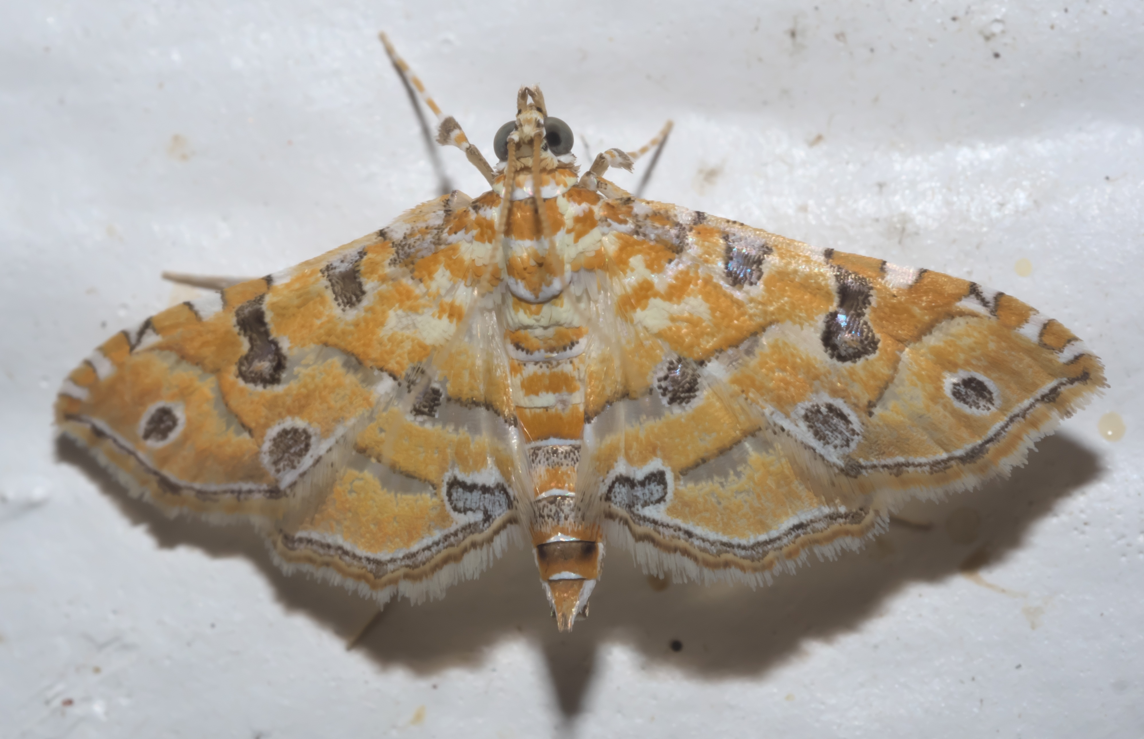 Ommatospila narcaeusalis, Ommatospila Moth - Hodges #5294, ID Confidence: 90